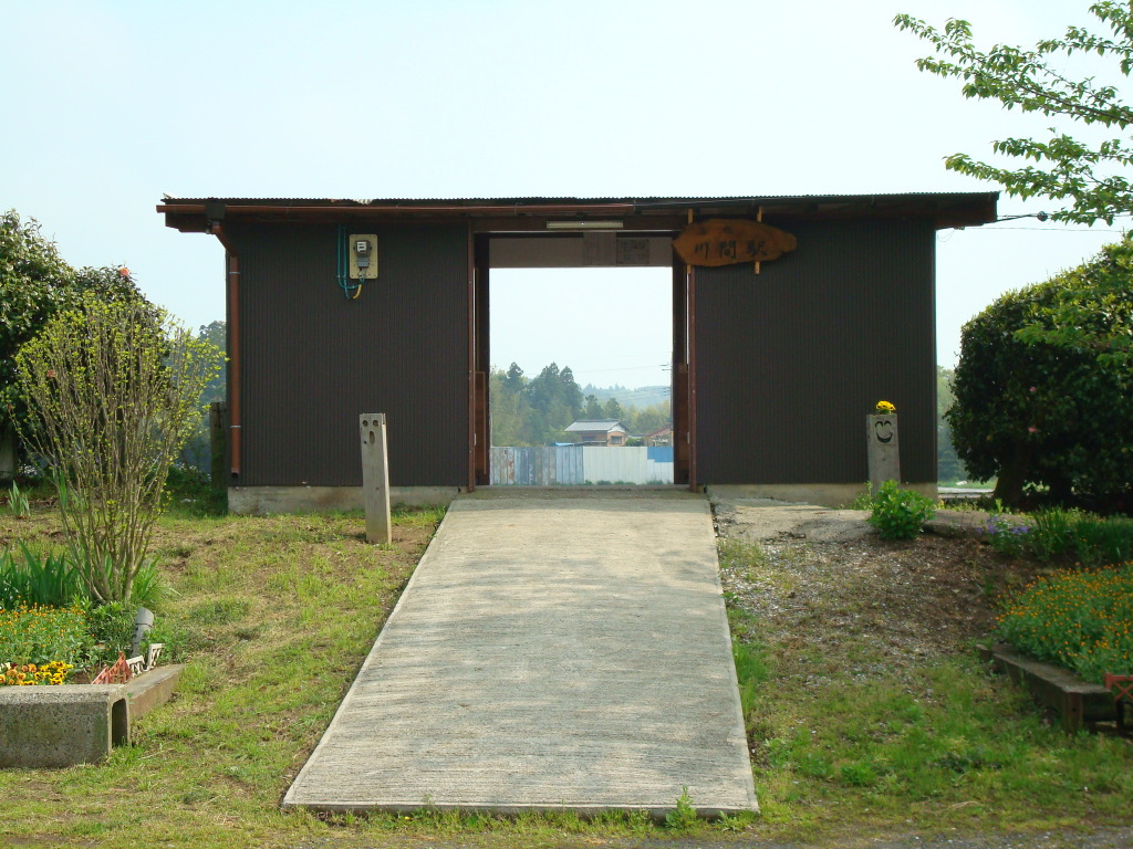 Kazusa-Kawama Station on the Kominato Line, Ichihara, Chiba, Japan